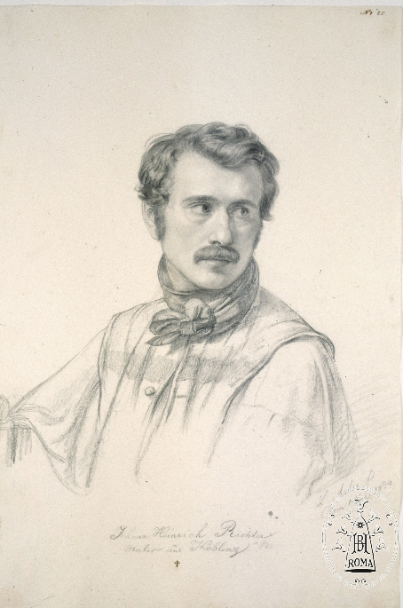 Portret tekening van Johann Heinrich Richter getekend door Louis Asher.